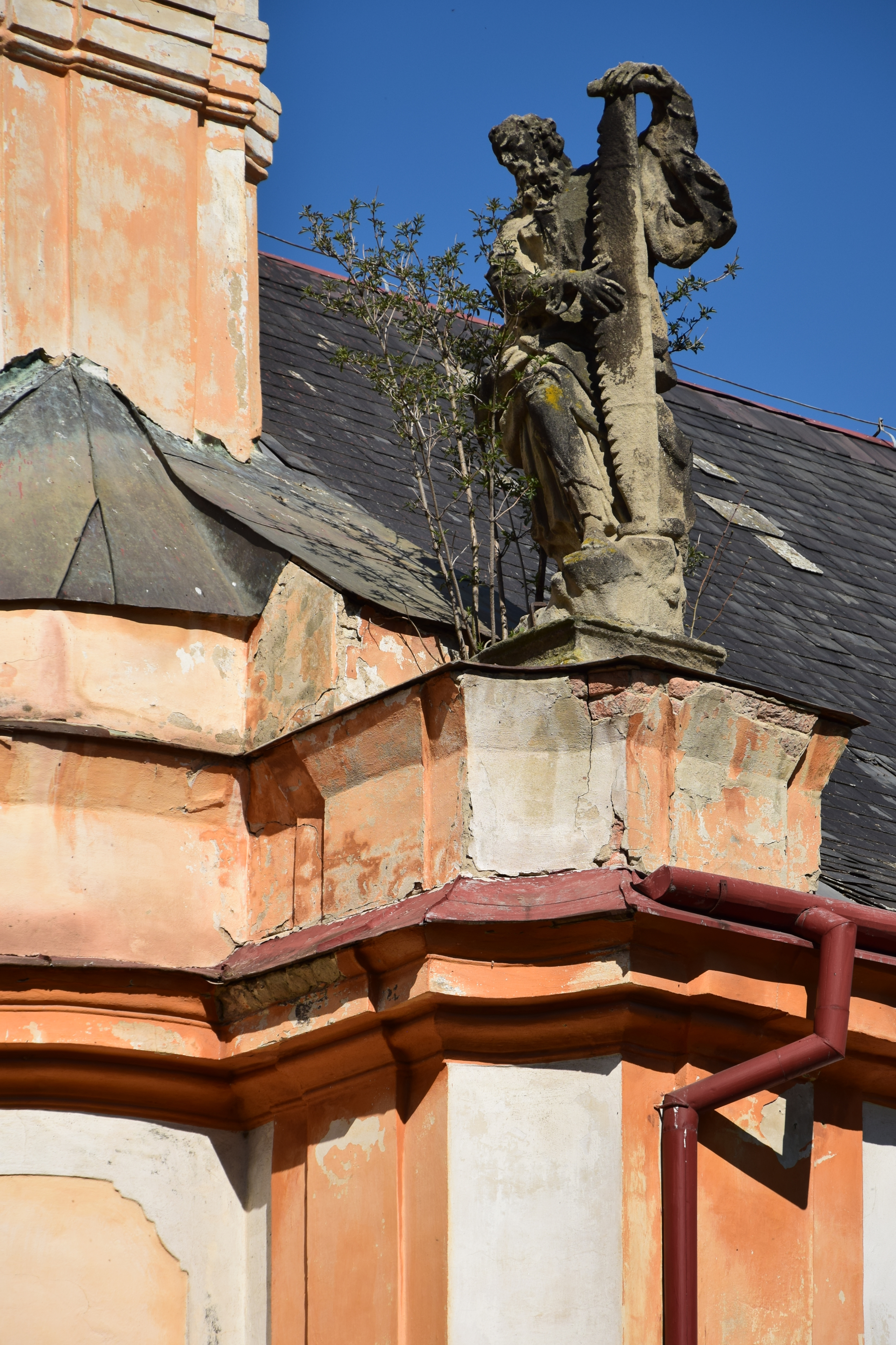 Břežany – Kostel svatého Šimona a Judy – socha svatého Šimona na nároží západního průčelí